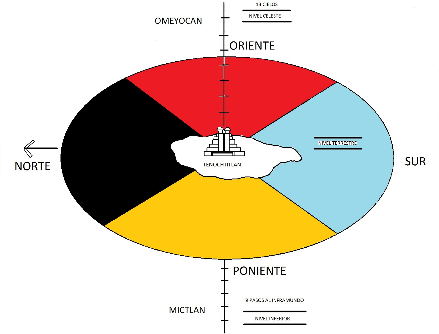 Imagen que representa la concepción del mundo según los nahuas. El axis mundi es el Templo Mayor y por ende la ciudad de Tenochtitlan, existe dos divisiones, una vertical y una horizontal, de esta última deriva la idea de una zona central y los cuatro puntos cardinales.